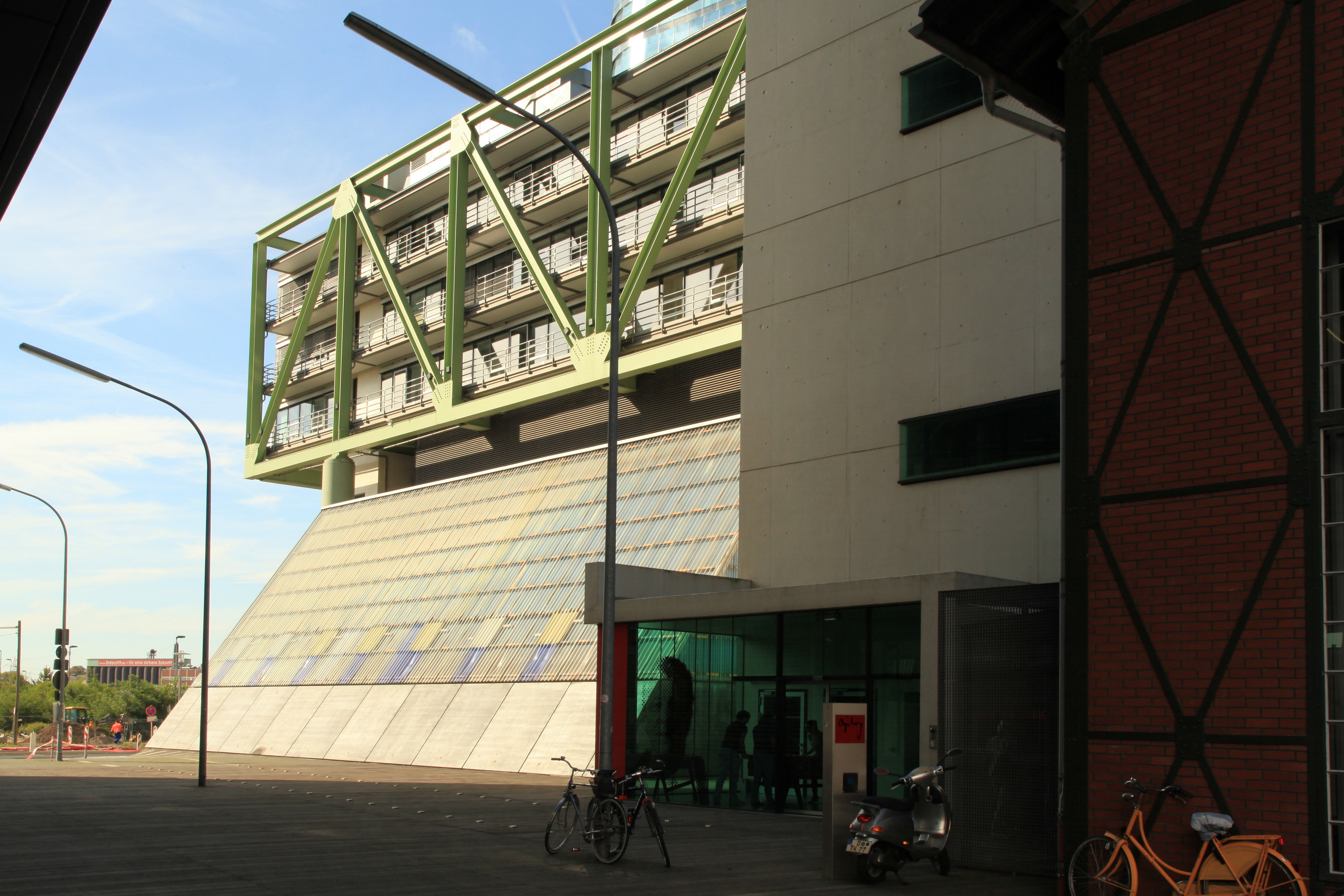 Port Event Center, Am Handelshafen in Düsseldorf